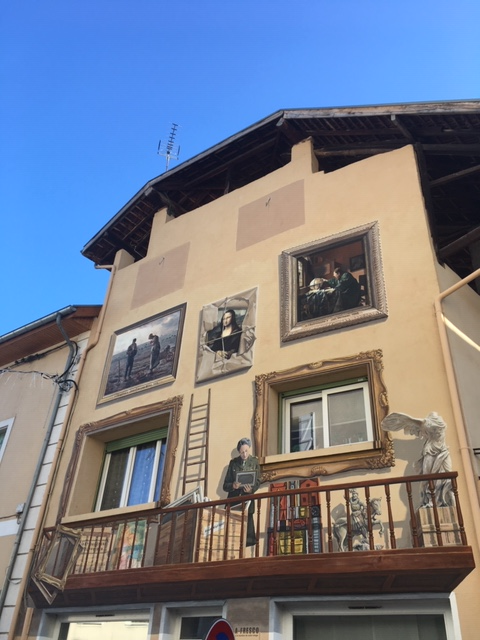 Fresque en mémoire des actions de sauvetage du patrimoine artistique de Rose Valland avant, pendant et après la IIe guerre mondiale.